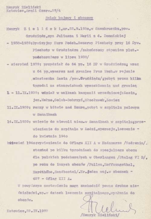 Dokument, opisujący szlak bojowy i - później - obozowy prof. Henryka Zielińskiego w latach 1938 - 1944. Sporządzony osobiście i własnoręcznie przezeń podpisany w 1972 roku.